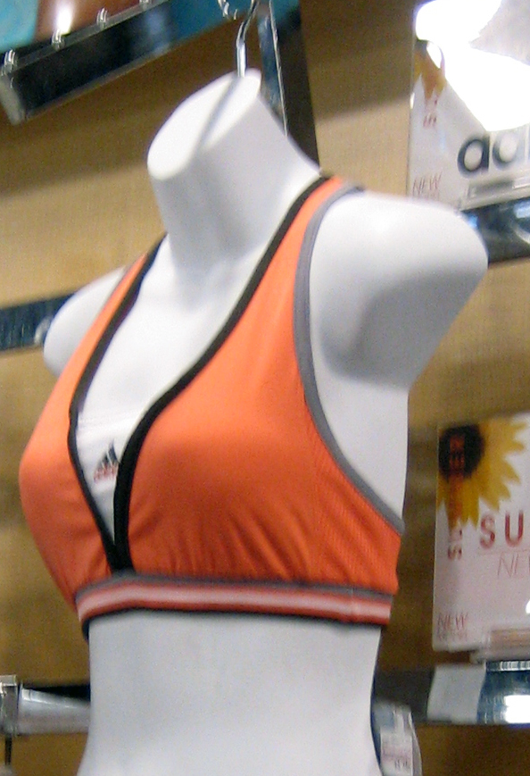 スポーツブラを着用しているマネキン。